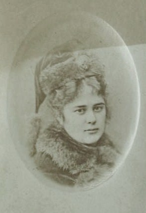 Ольга Андреевна Голохвастова, ур. Андреевская (1840—1897), внебрачная дочь графини Е. П. Ростопчиной от связи с А. Н. Карамзиным.